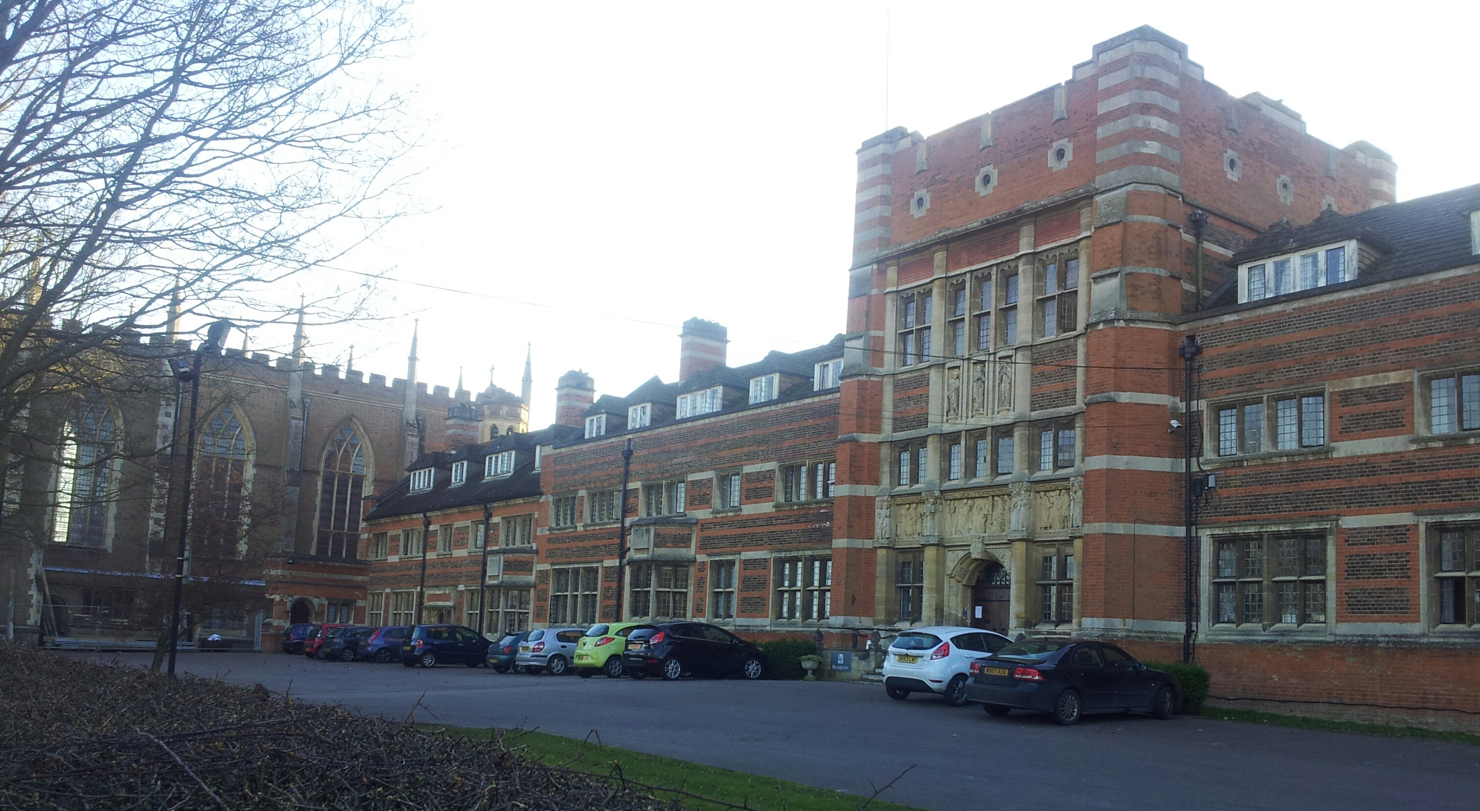 All Saints Pastoral Centre